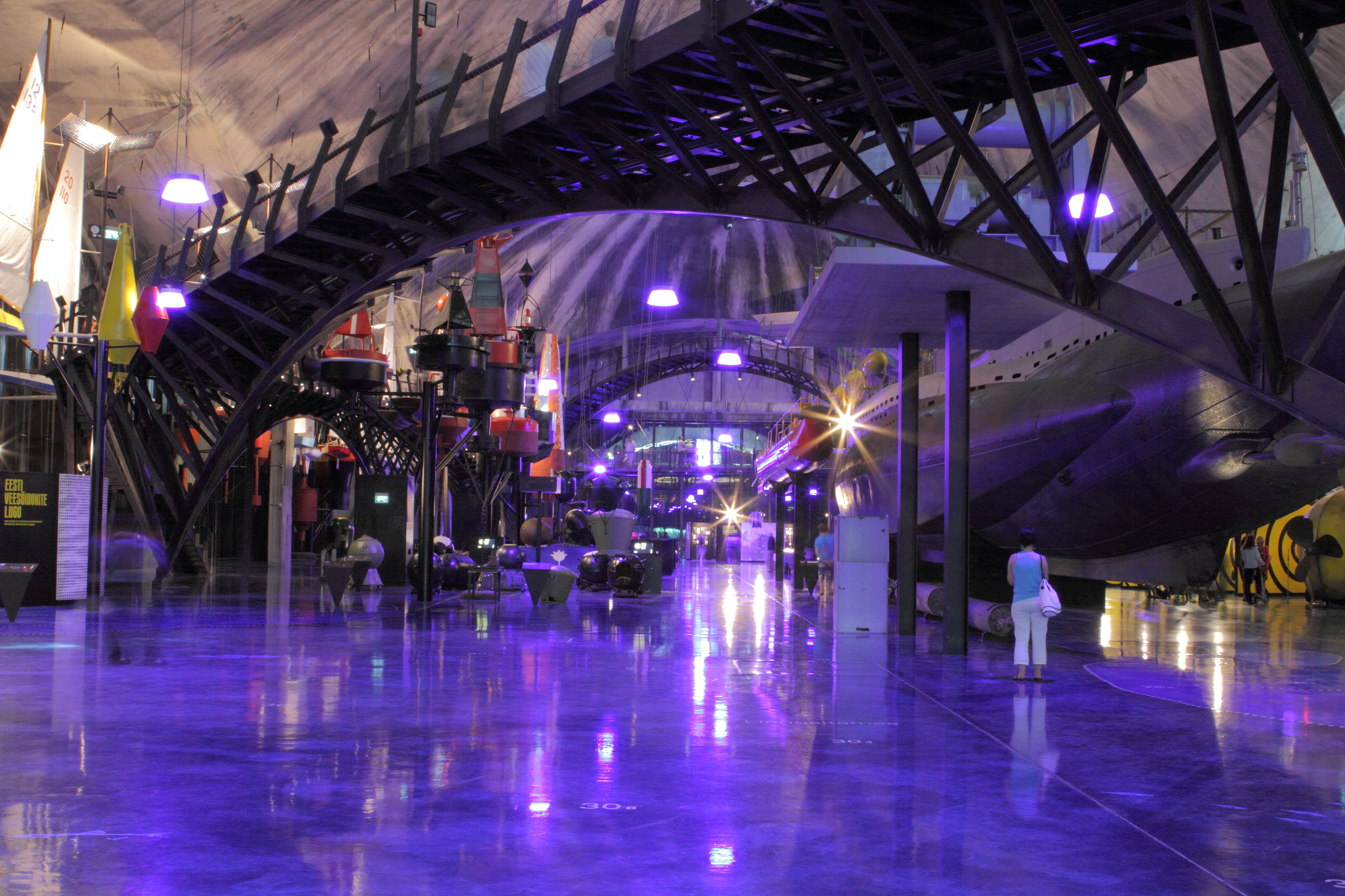 Renoveeritud Tallinna vesilennukite angaarid, allveelaev Lembit ja Eesti Meremuuseumi ekspositsioon pildistatuna alumiselt korruselt.